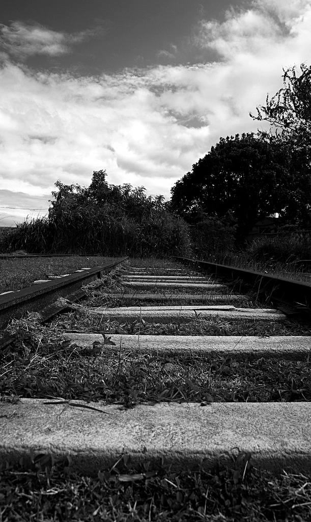 Vía abandonada en Arroyo, Puerto Rico; parte del Tren del Sur.